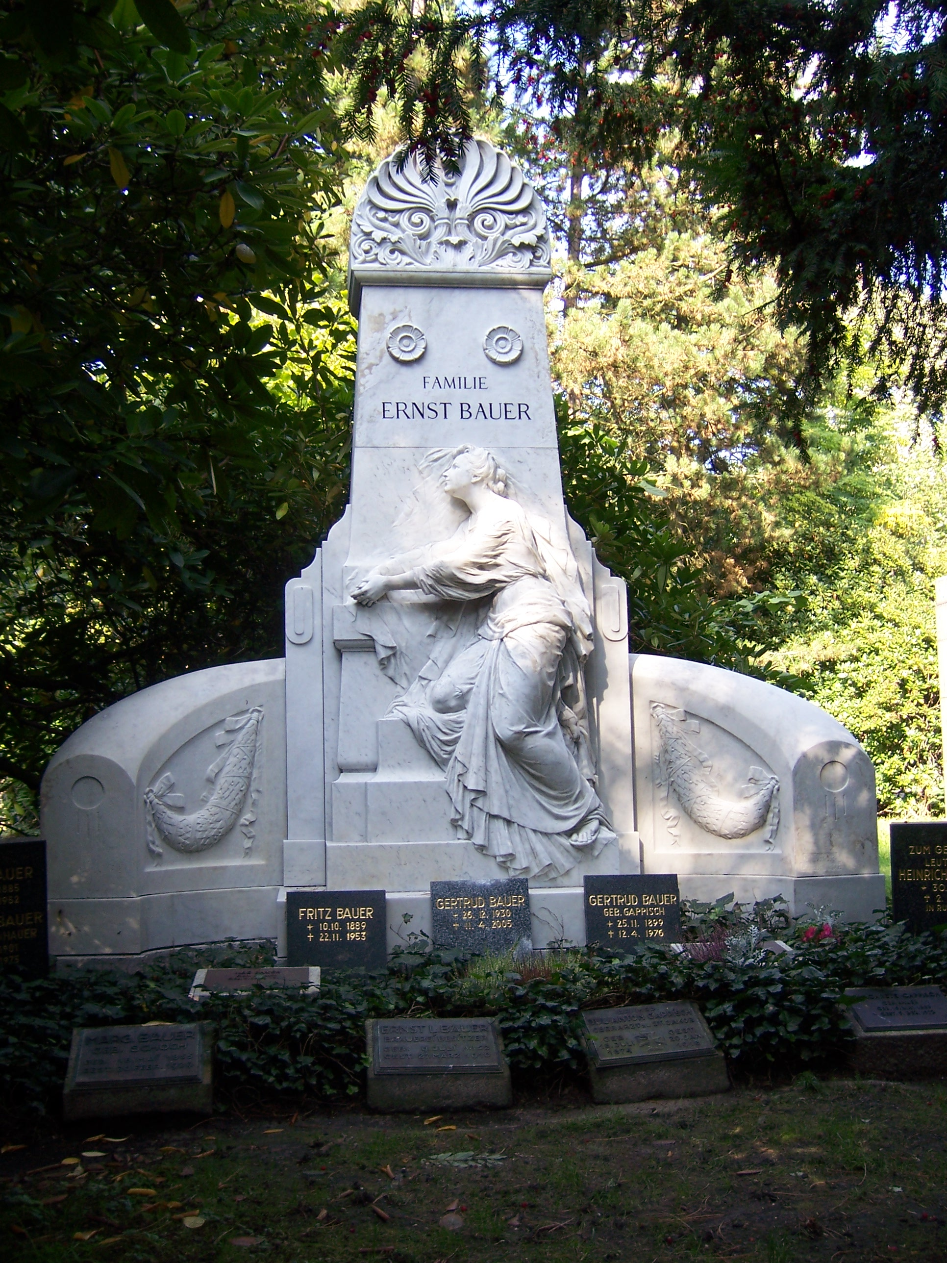 Familiengrab Ernst Bauer